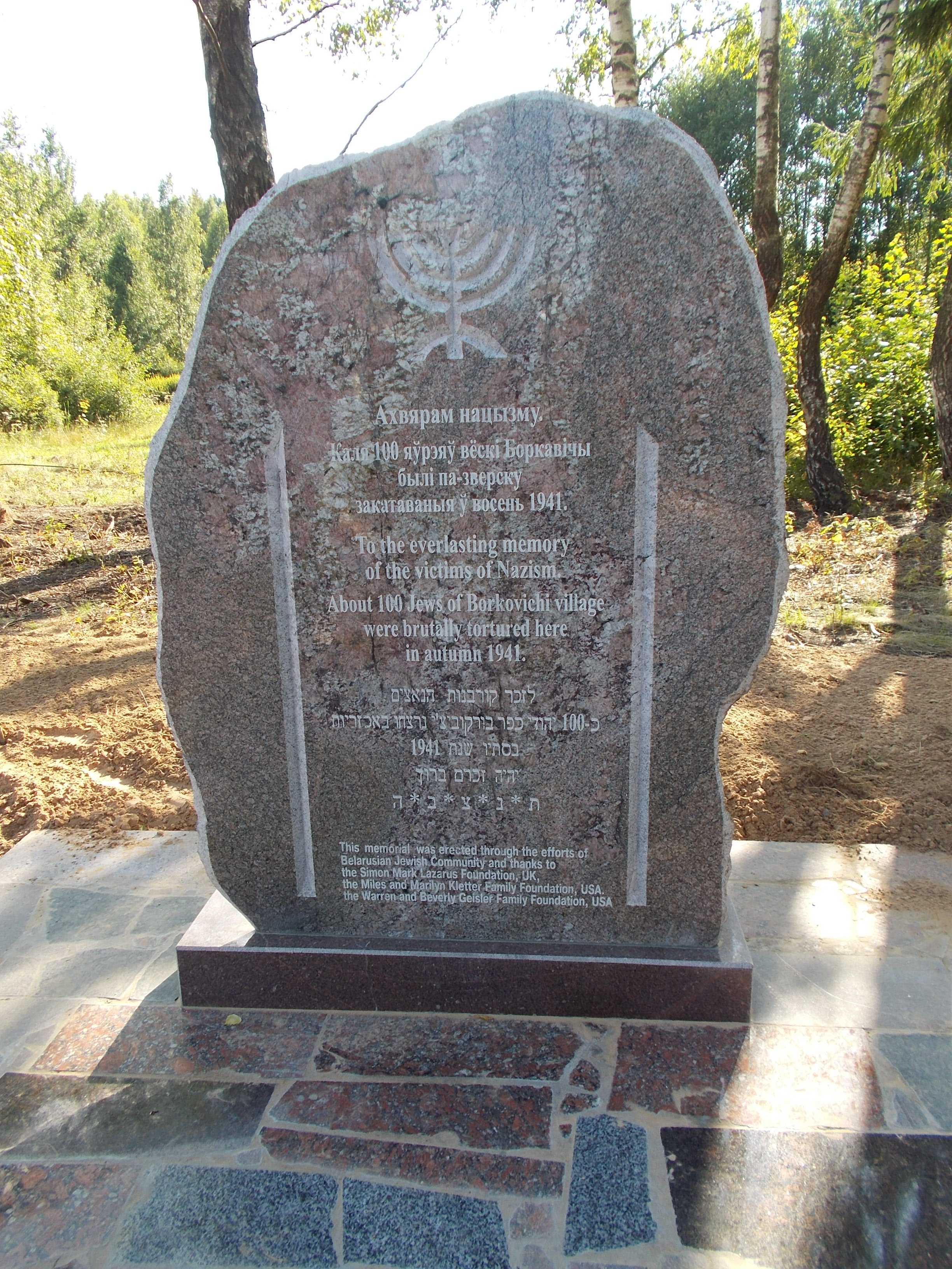 Место расстрела более ста евреев - узников гетто в Борковичах (Верхнедвинский район) осенью 1941 года. Справа от шоссе в направлении к югу (на Дисну), напротив южной околицы деревни Магеры, около ста метров от дороги.